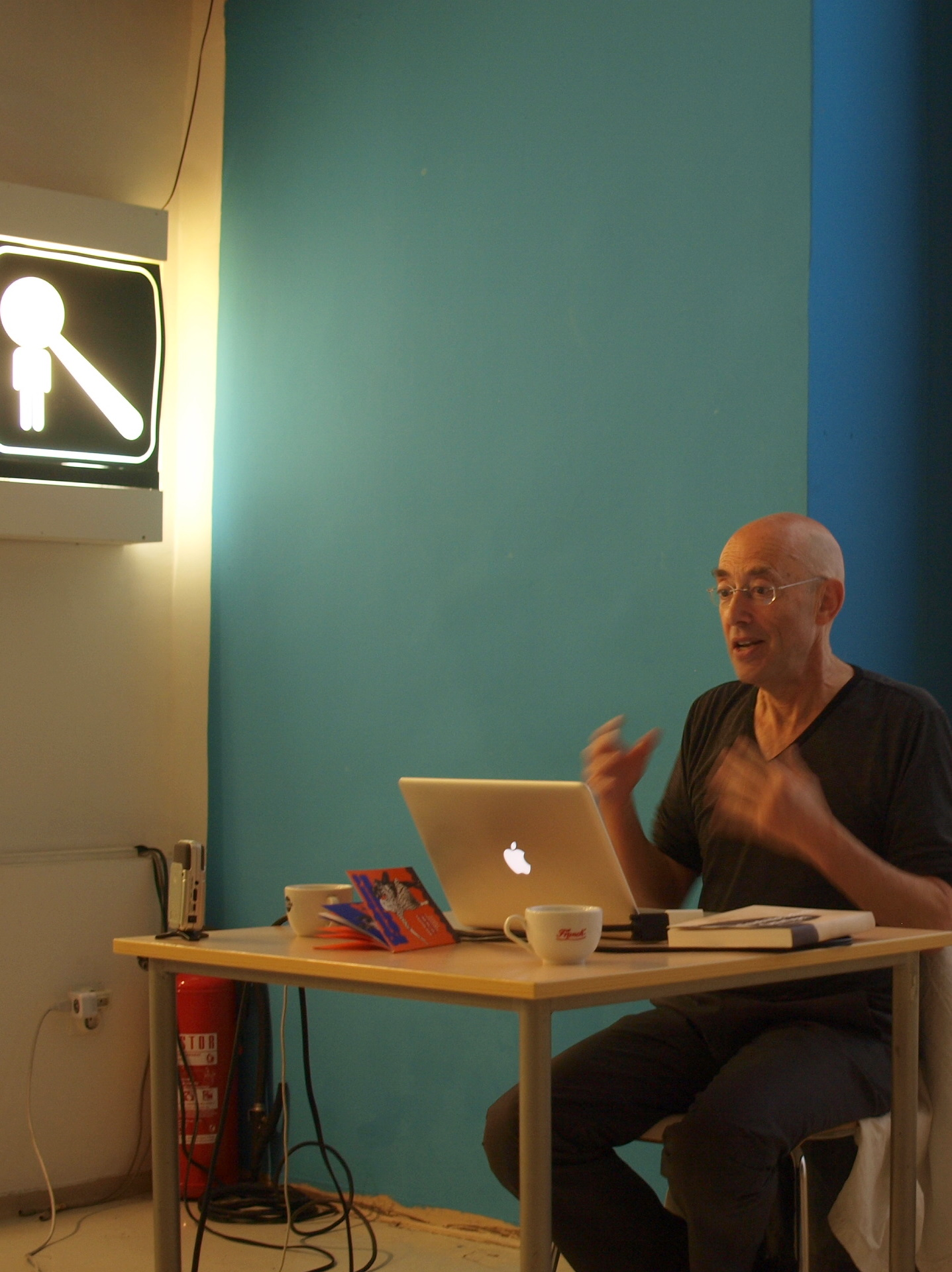 Četvrtak, 04.06., od 19:00 u klub za net.kulturu MAMA (Preradovićeva 18), predavanje u sklopu serije "Budućnost knjige u digitalnom dobu": Bob Stein: "Evolucija čitanja i pisanja u eri umreženosti" Organizirali Multimedijalni institut i Književni klub Booksa. Audio: is.gd/Pi0M